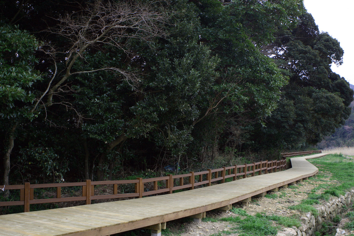 대한민국 천연기념물 제339호 완도 미라리 상록수림